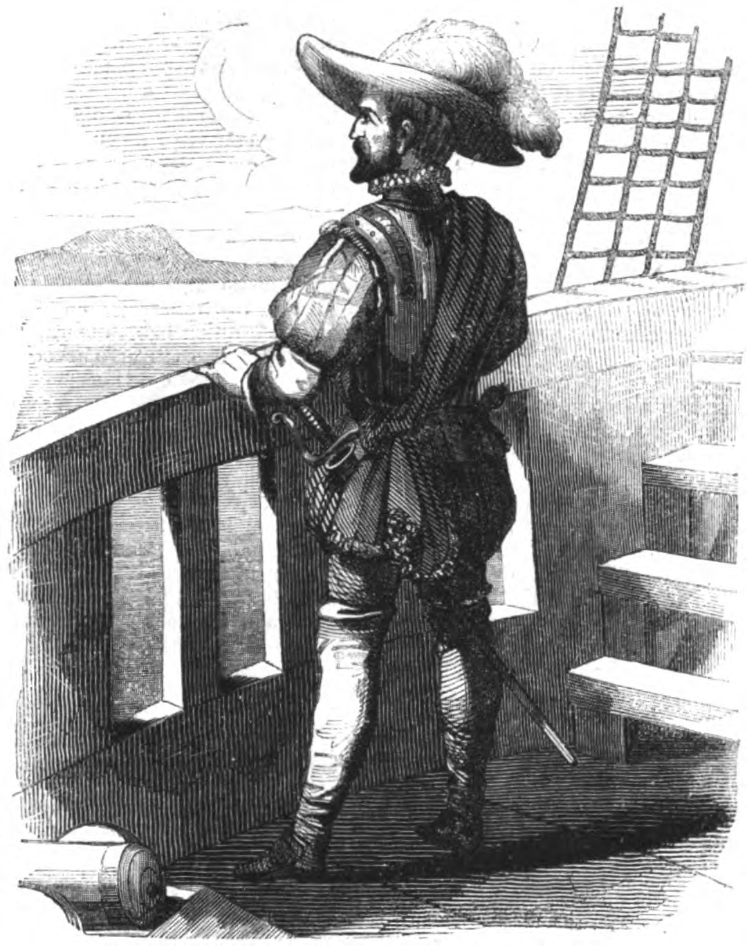 El conquistador Francisco Pizarro navegando por la costa de Tumbez, en su segundo viaje hacia el Perú.